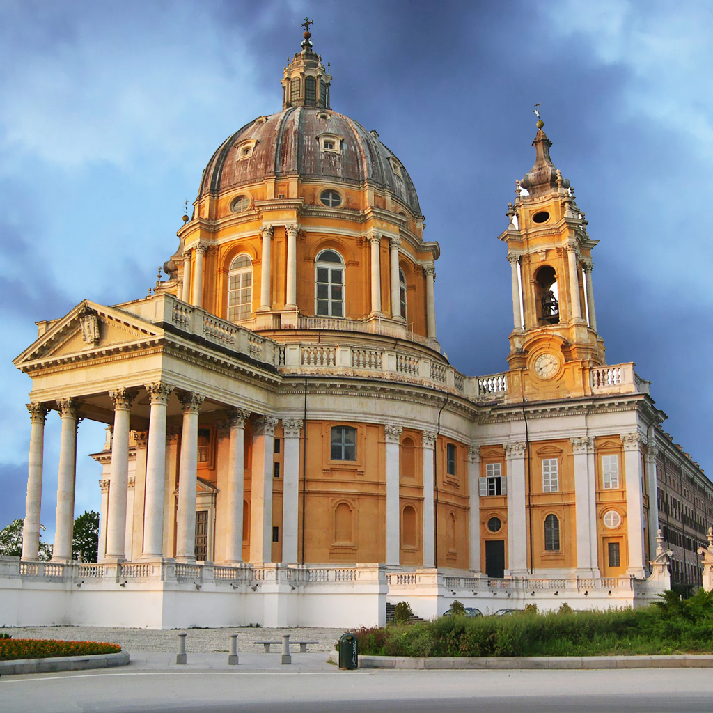 Basilica di superga